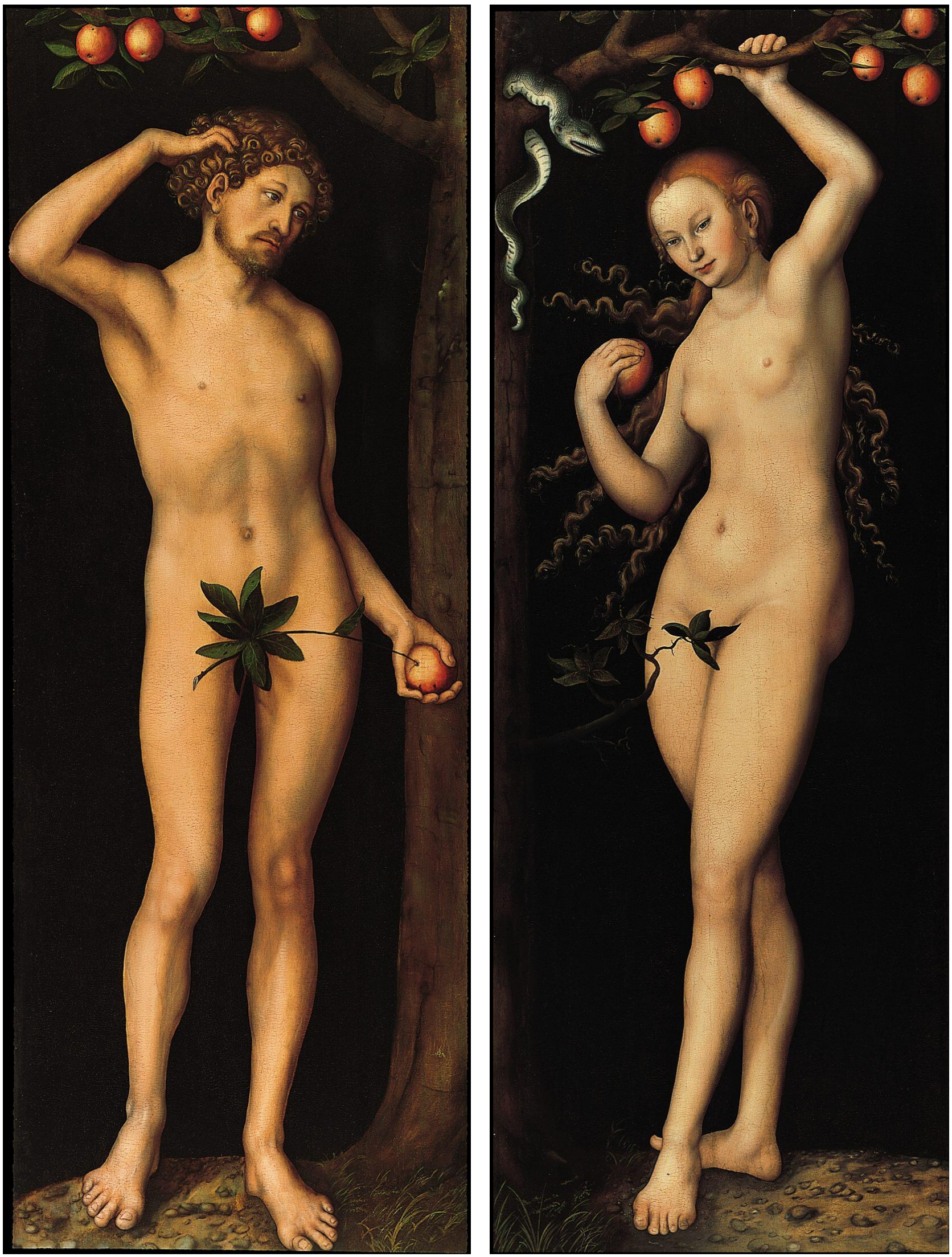 a pair